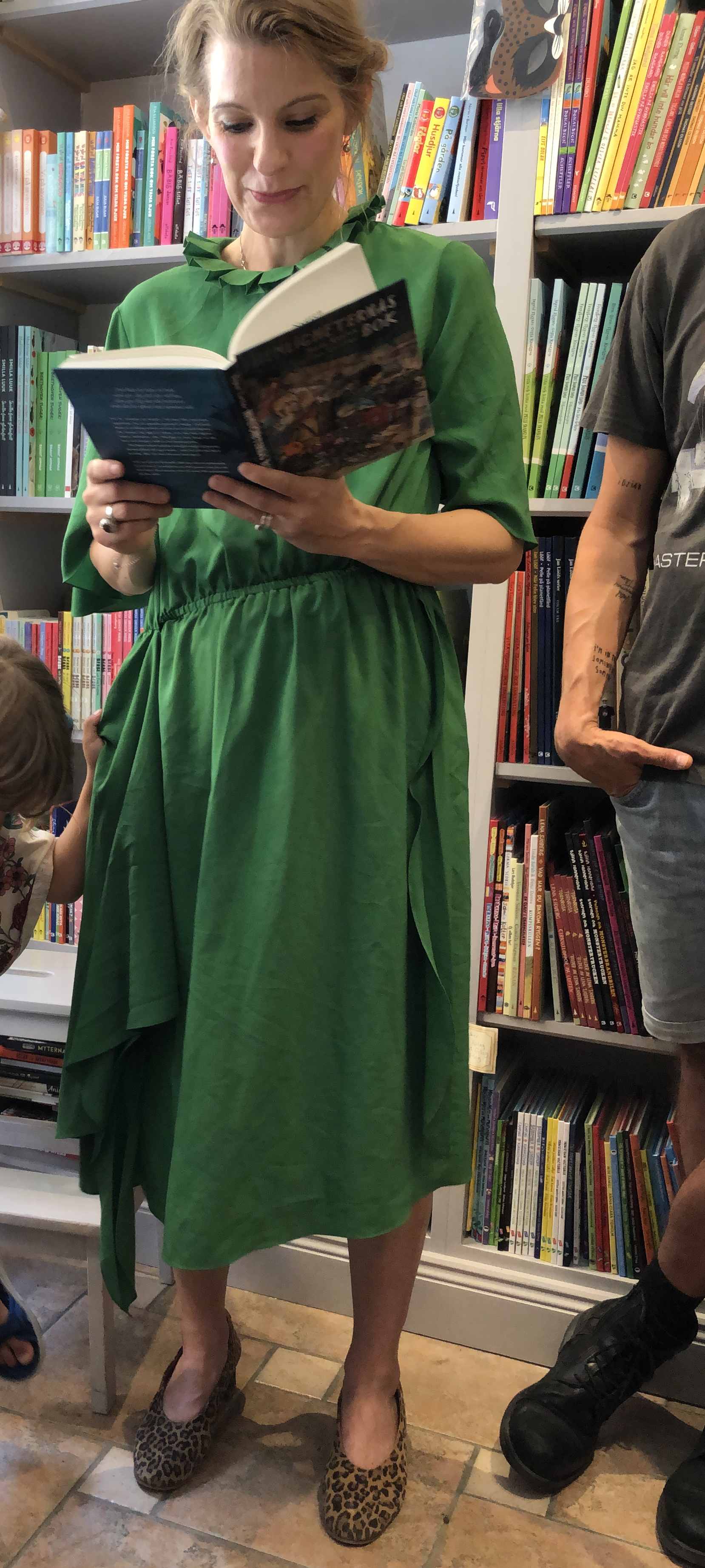 Författare Maria Nygren, releasefest på bokhandeln Bokbok, Södermalm